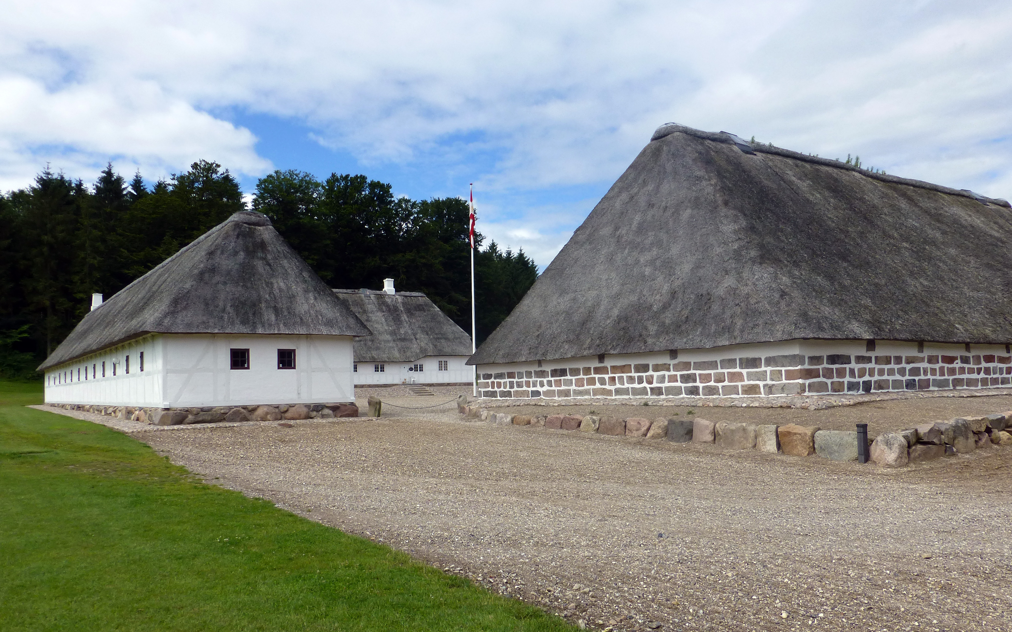 Uldrupgård set fra sydøst